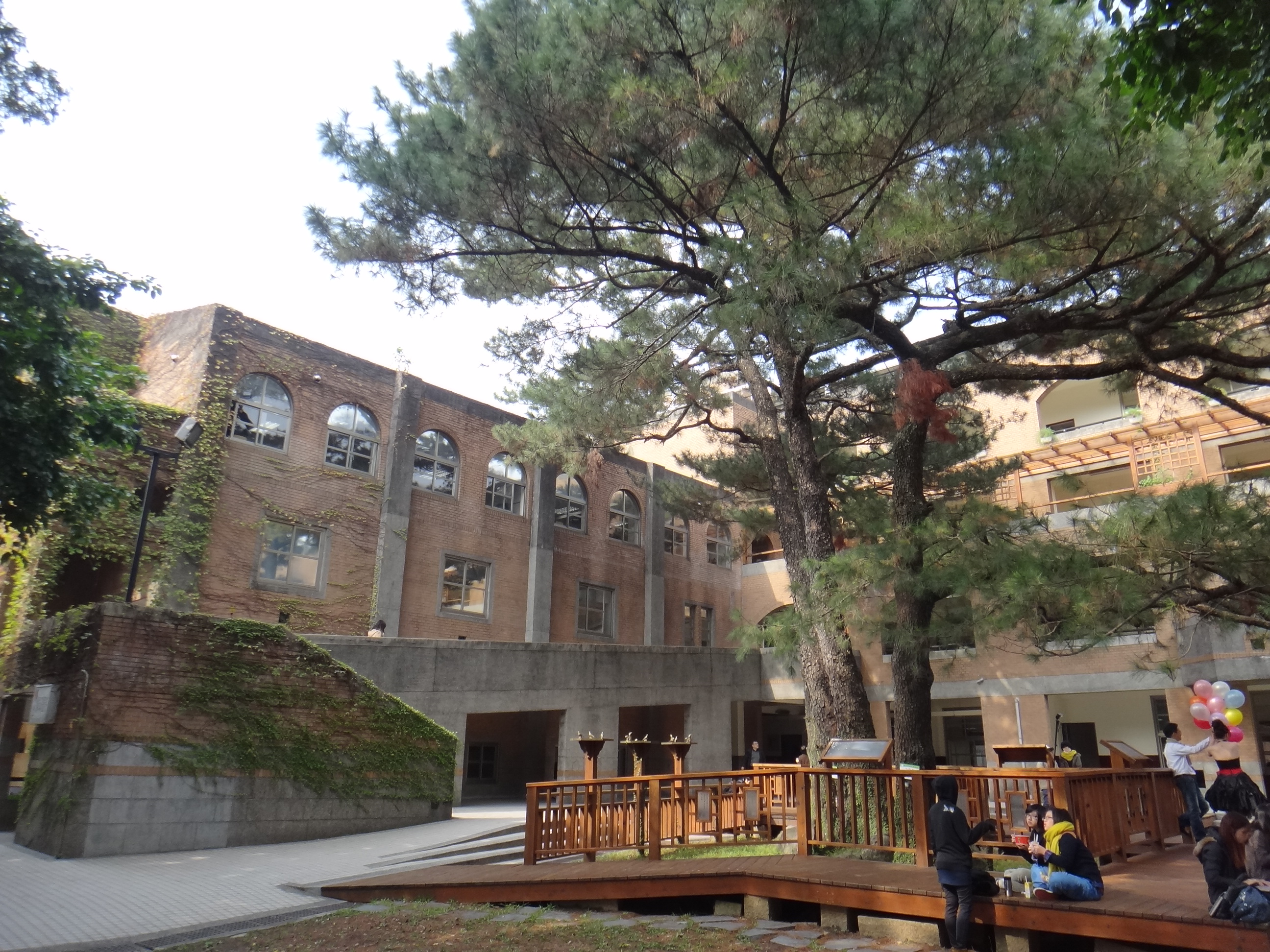 國立臺灣大學共同教學館舟山路側與共同三松。